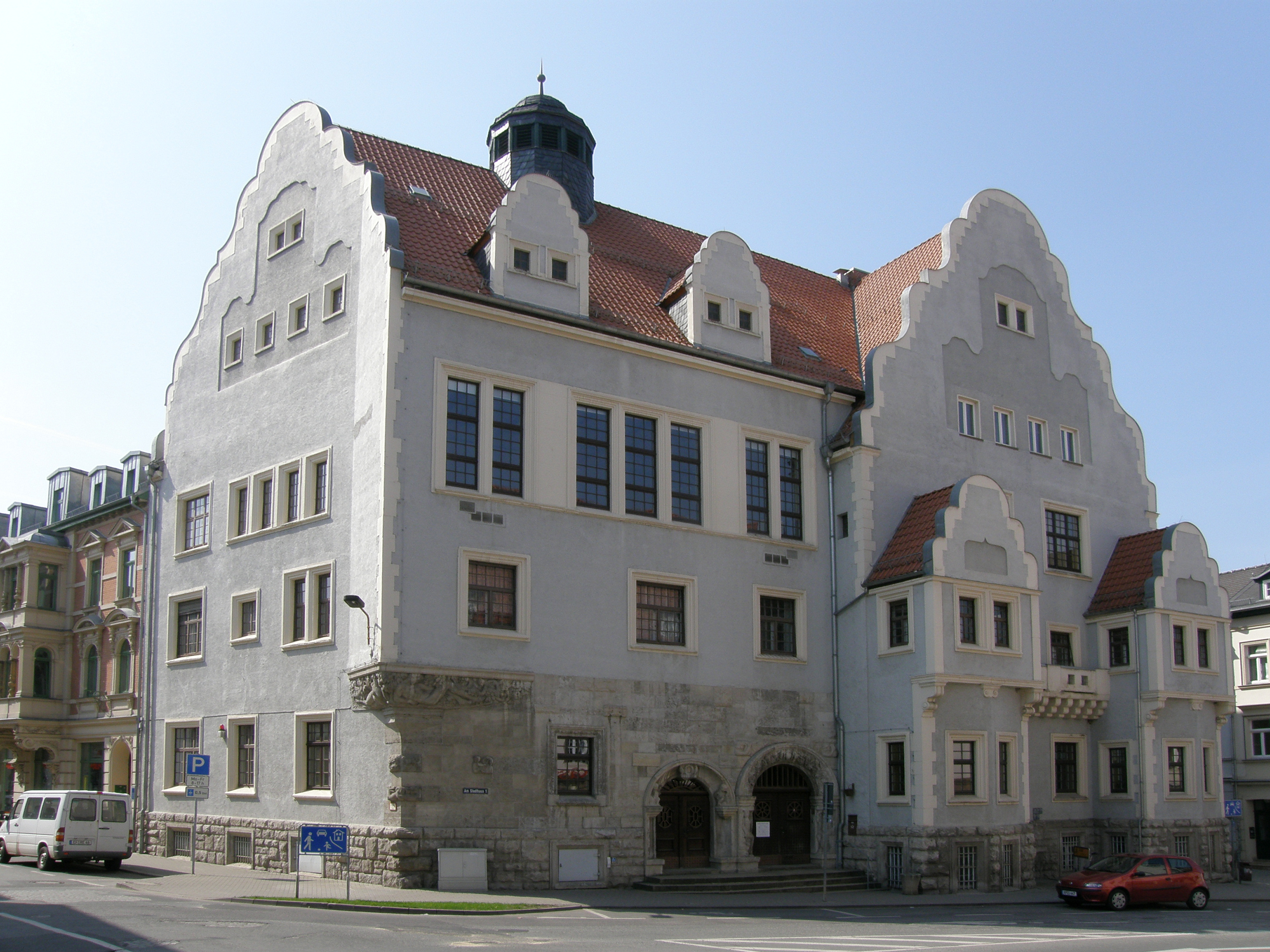 Stadthaus in Apolda, Thüringen; erbaut 1906-1908 nach Entwurf von Otto Schnartz (München); unter Denkmalschutz